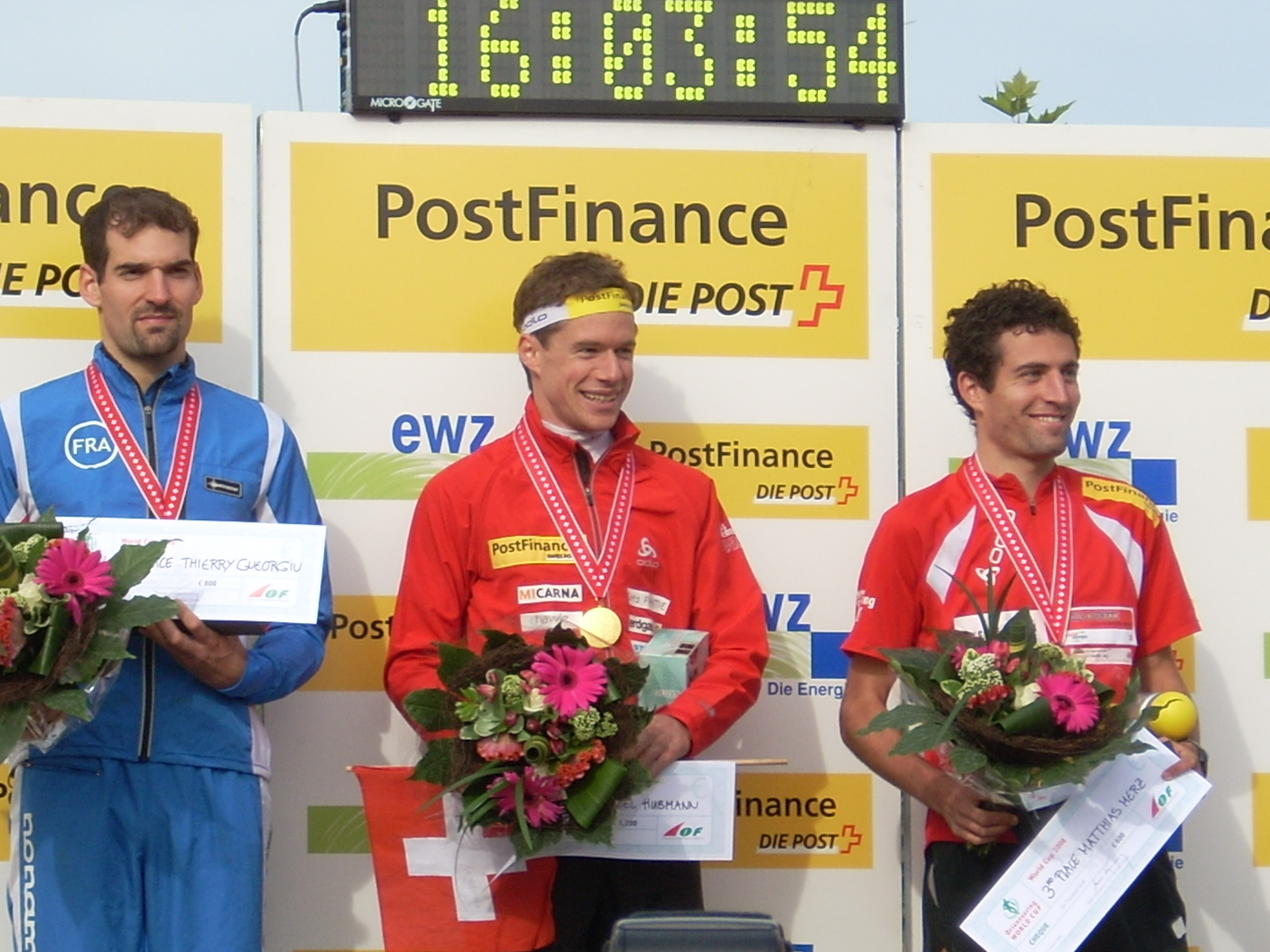 Podium Gesamtweltcup Sept. 2008 (Thierry Gueorgiou, Daniel Hubmann, Matthias Merz).